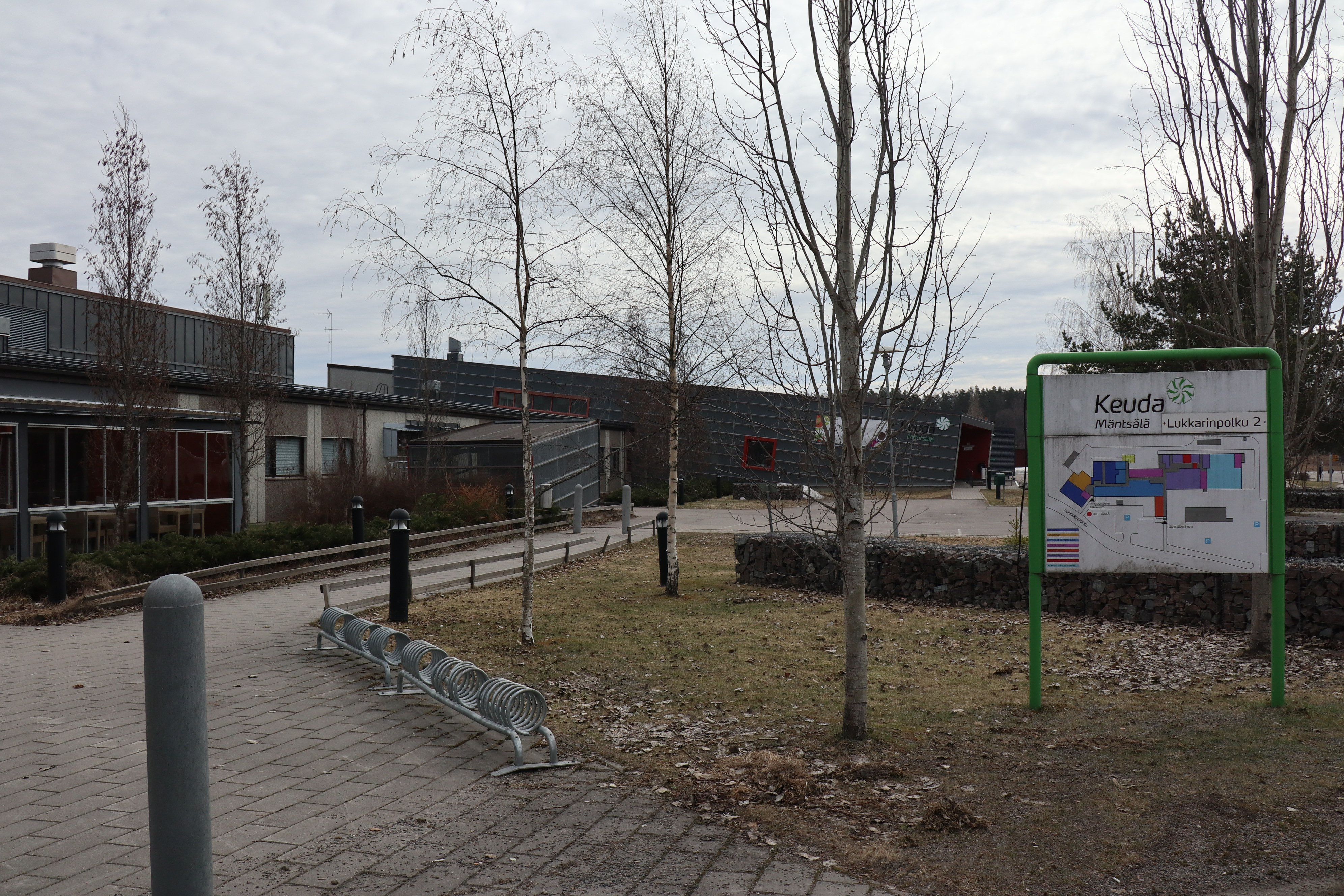 Keuda Mäntsälä.